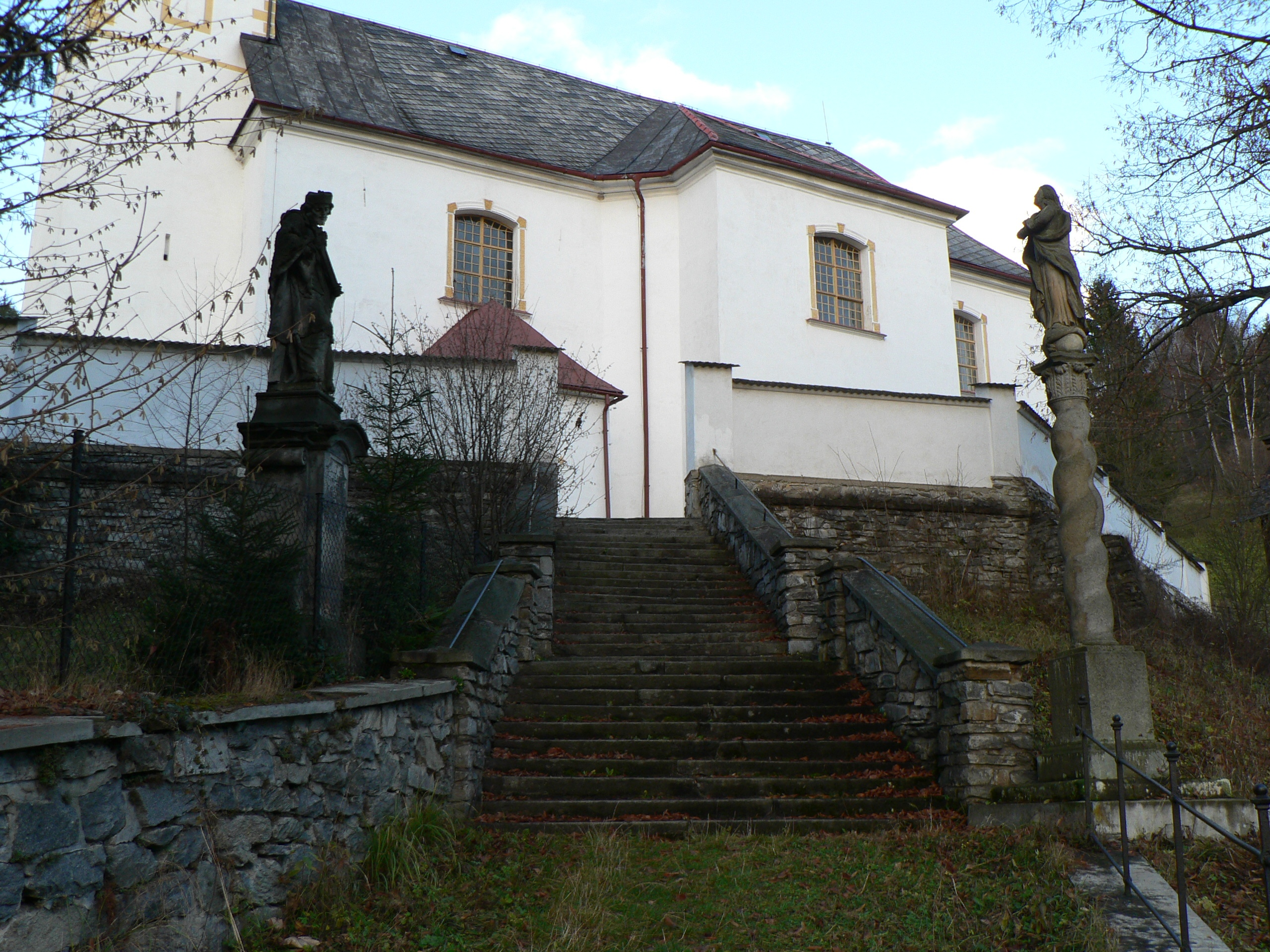 Kostel svatého Mikuláše (Hanušovice)